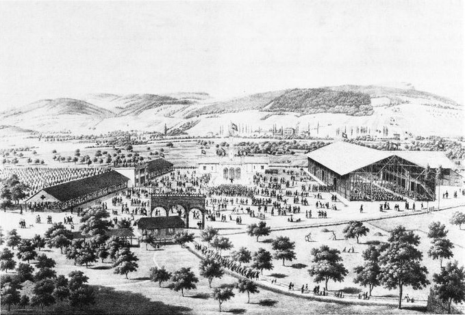 Die Bauten des Eidgenössischen Feldschiessens 1849